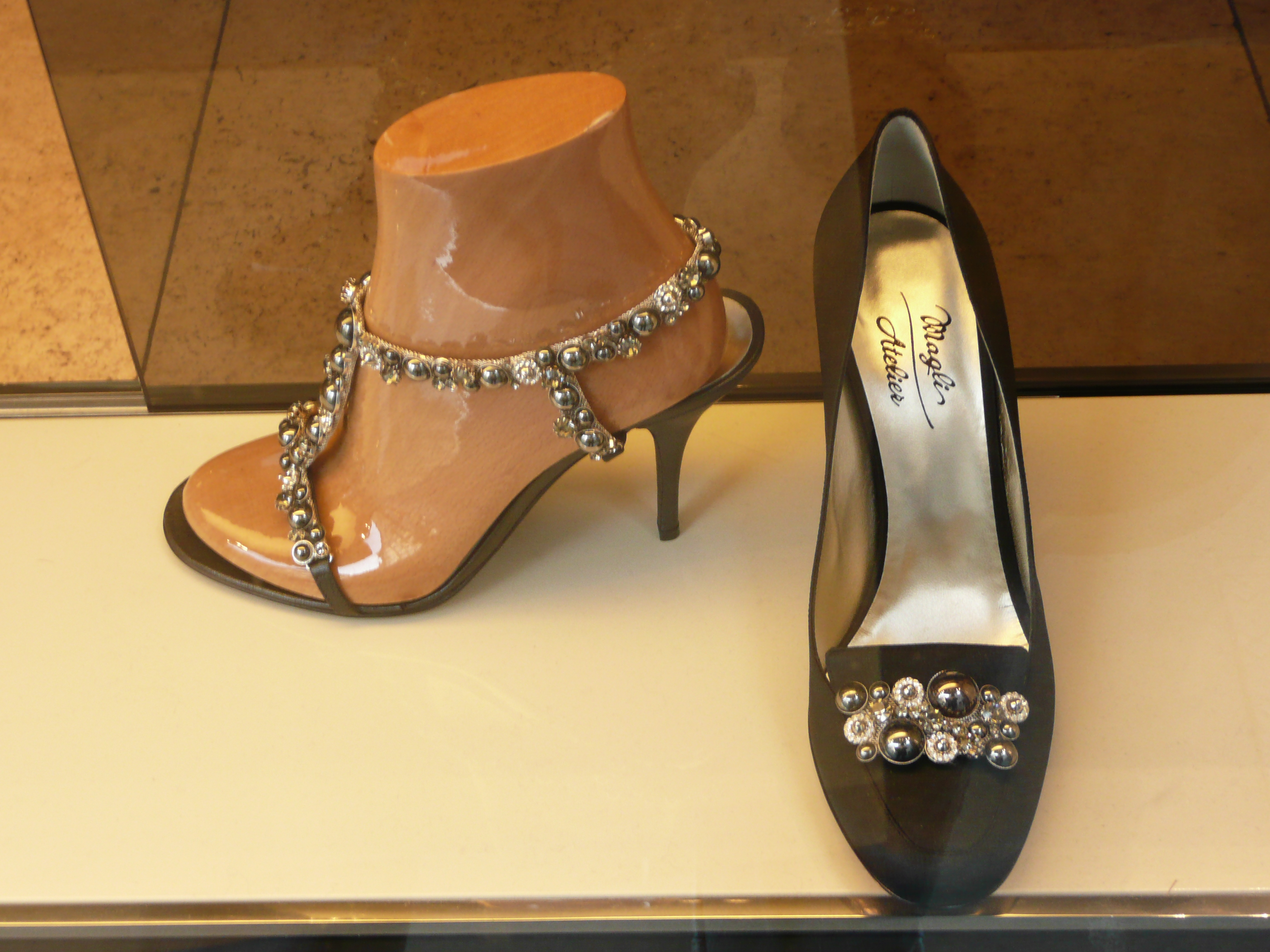 Shoes; Via Montenapoleone in Milano